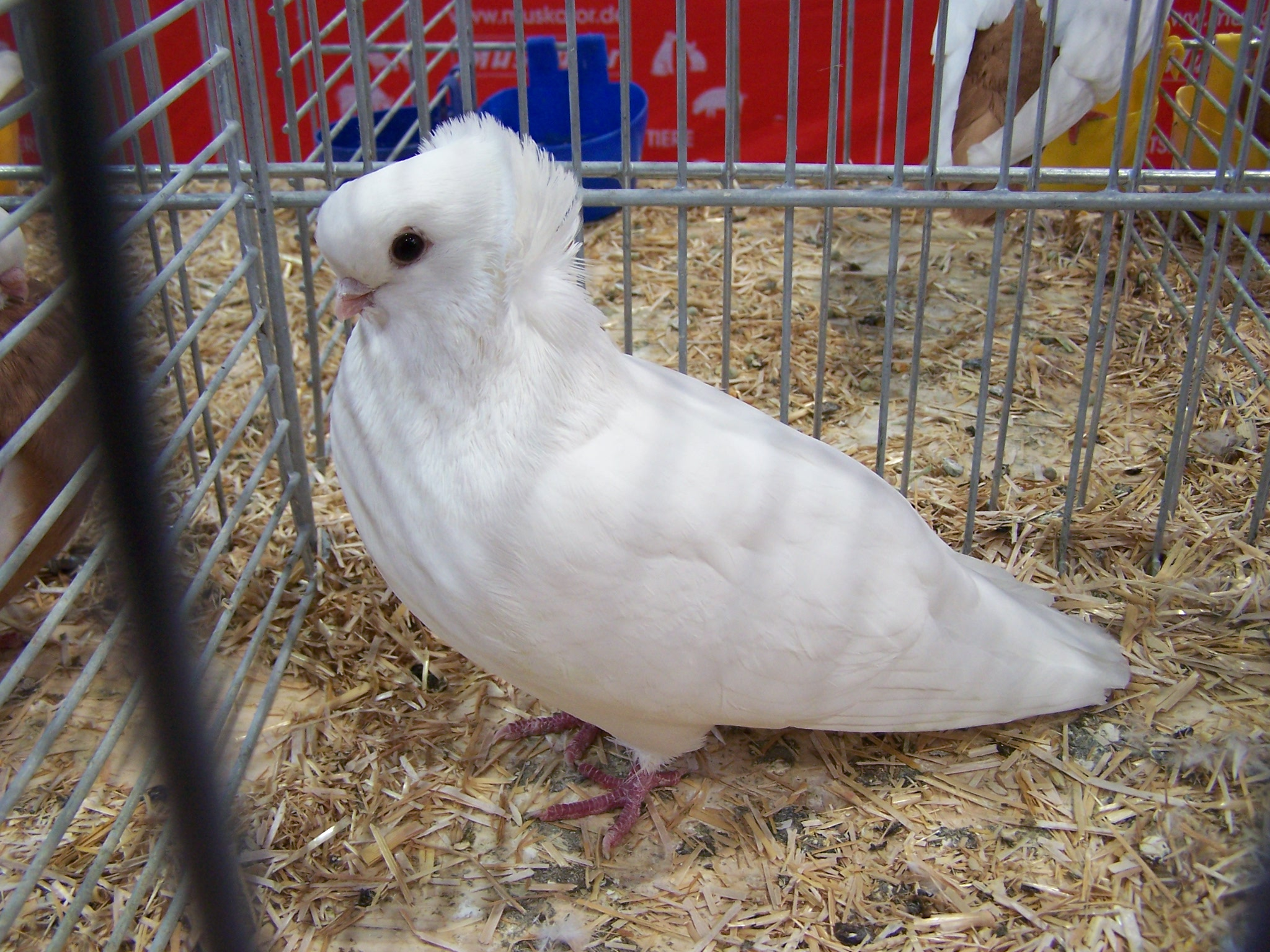 Fely wit